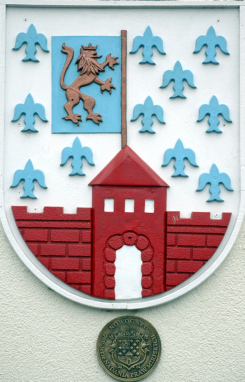 Herb Nowogardu na ratuszu w Nowogardzie.